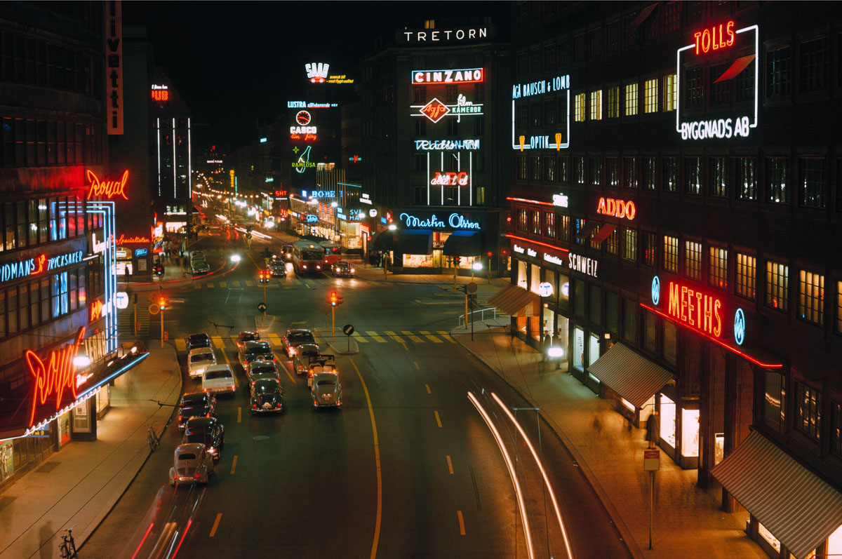 Nattbild från Kungsgatan 1964 tag: Utsikt från Malmskillnadsgatan Photograph by: Trapp, Håkan Date: 1964 Photo Nr: 2108-919 To the museum database (text in swedish)